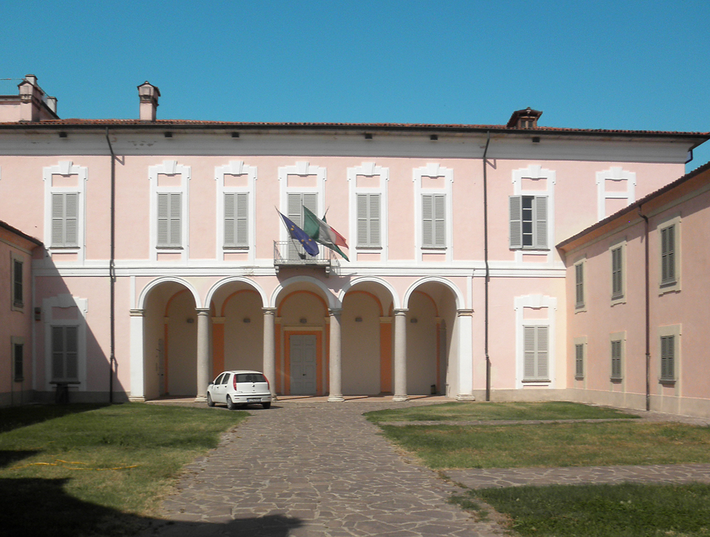 Comazzo, Villa Pertusati